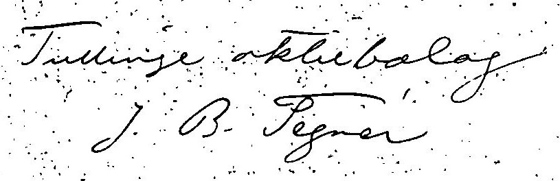 Jakob Tegnérs namnteckning på en avstyckningshandling för Tullinge gård